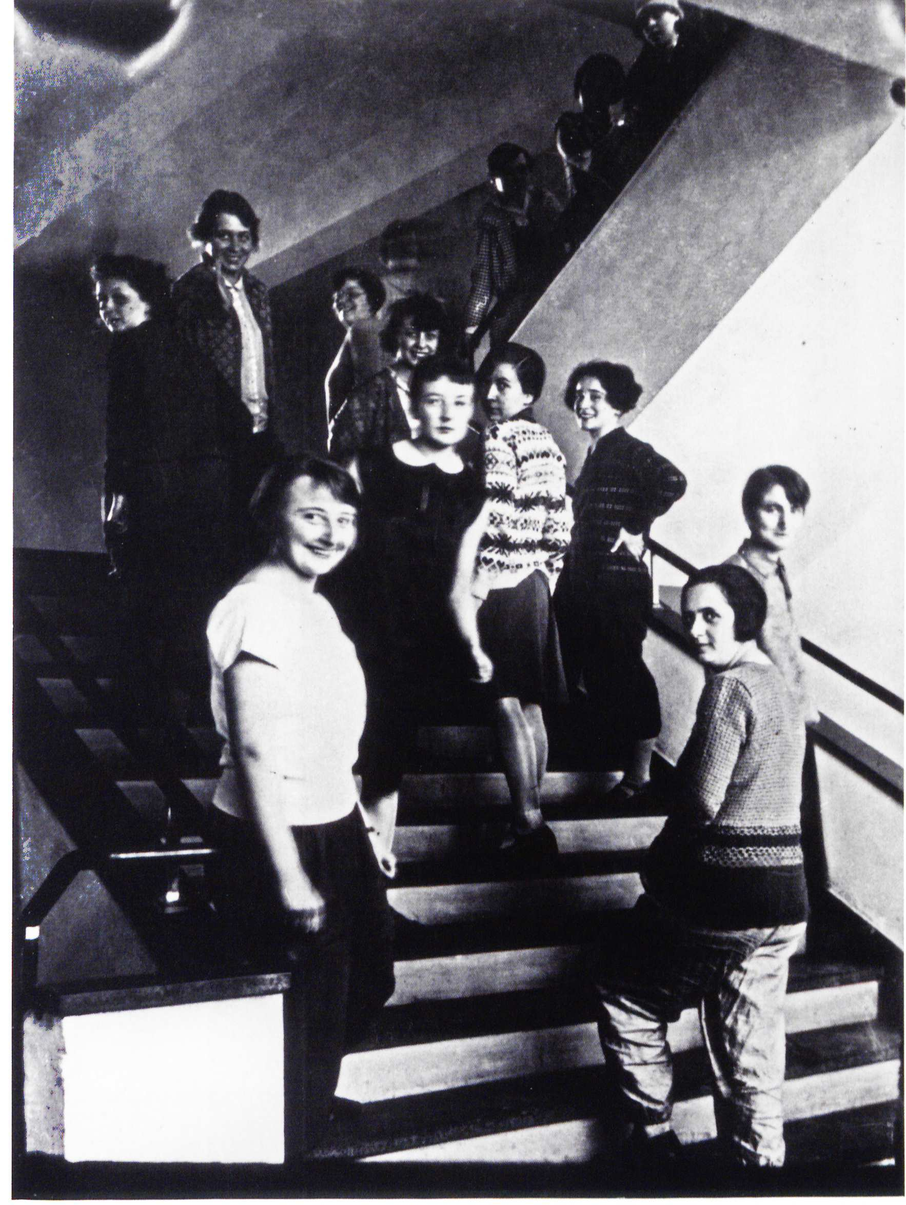 Oskar Schlemmer Webereiklasse auf der Bauhaustreppe 1927 oder 1928 ab dem Treppenabsatz von oben nach unten: Gunta Stölzl (Mitte); Margaretha Reichardt (links); Ljuba Monastirskaja (Brille); Otti Berger; Elisabeth Müller (heller gemusterter Pullover); Lis Beyer-Volger (weißer Kragen); Rosa Berger (dunkler Pullover); Lena Meyer-Bergner (links); Ruth Hollós-Consemüller (rechts außen); Lisbeth Oestreicher.